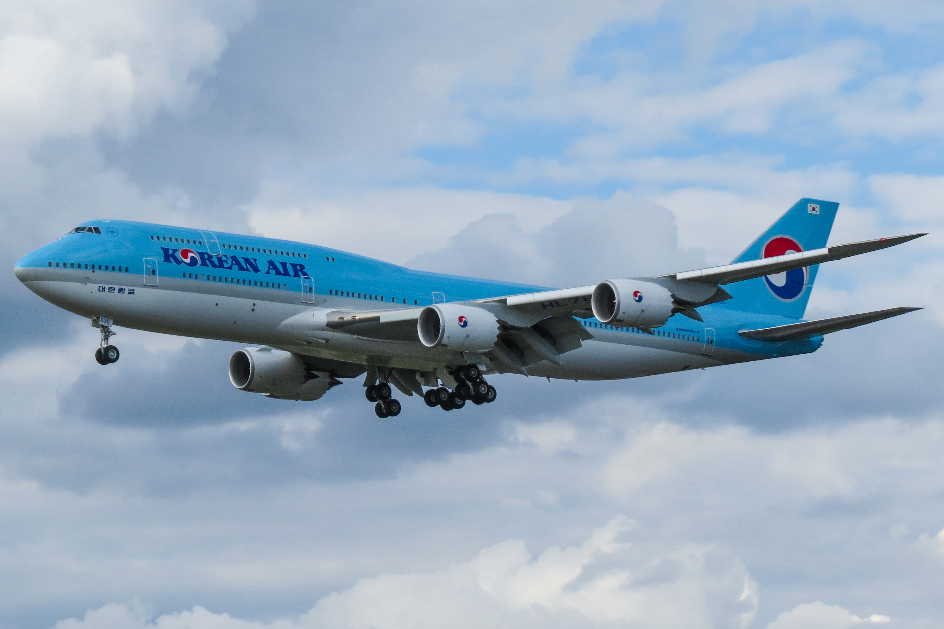 Korean Air HL-7630 Boeing 747-8, 04.Sep.2015 FRA